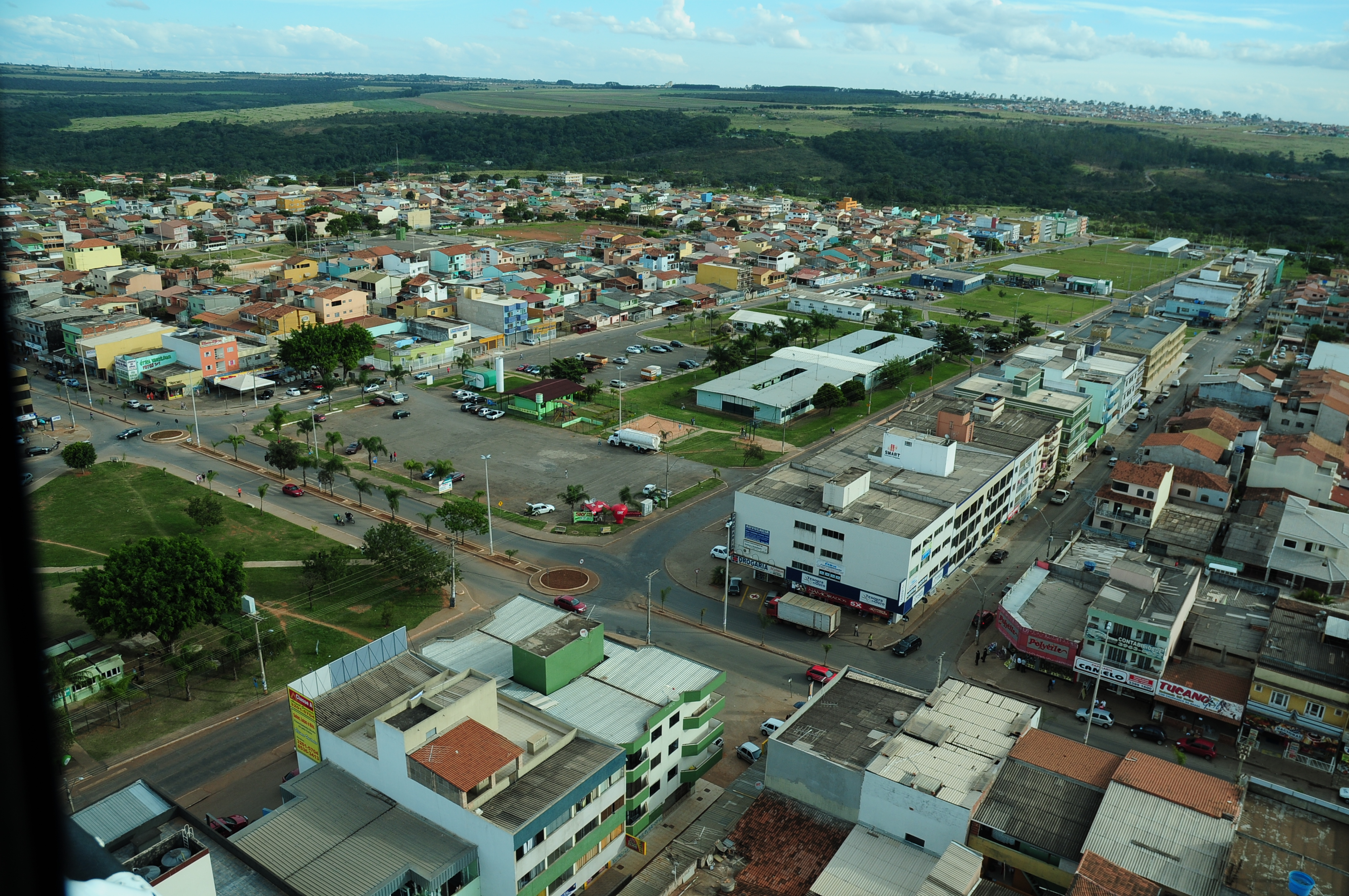 Vista parcial de Riacho Fundo - DF.